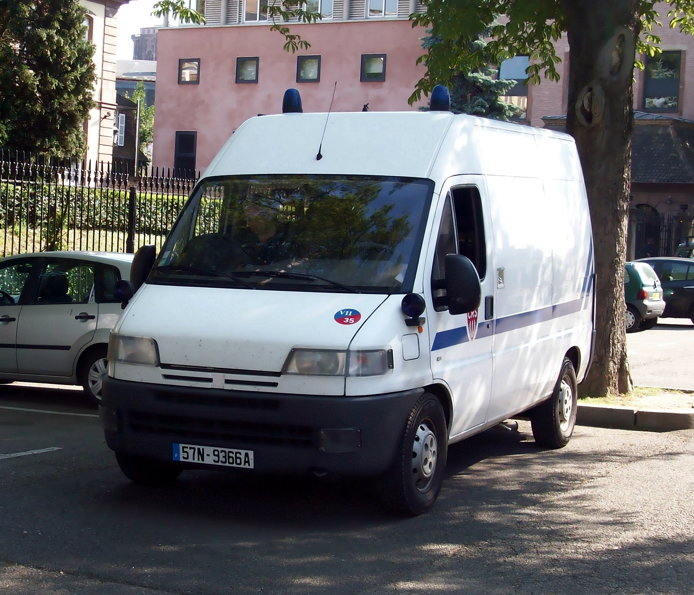 Fourgon CRS à Strasbourg.